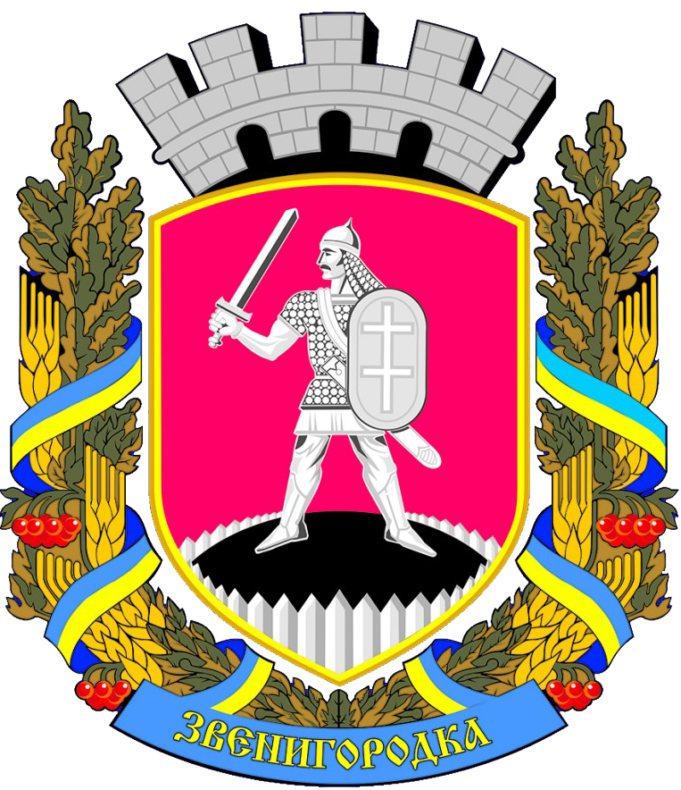 Сучасний Герб Звенигородки (Черкаська обл. Україна).